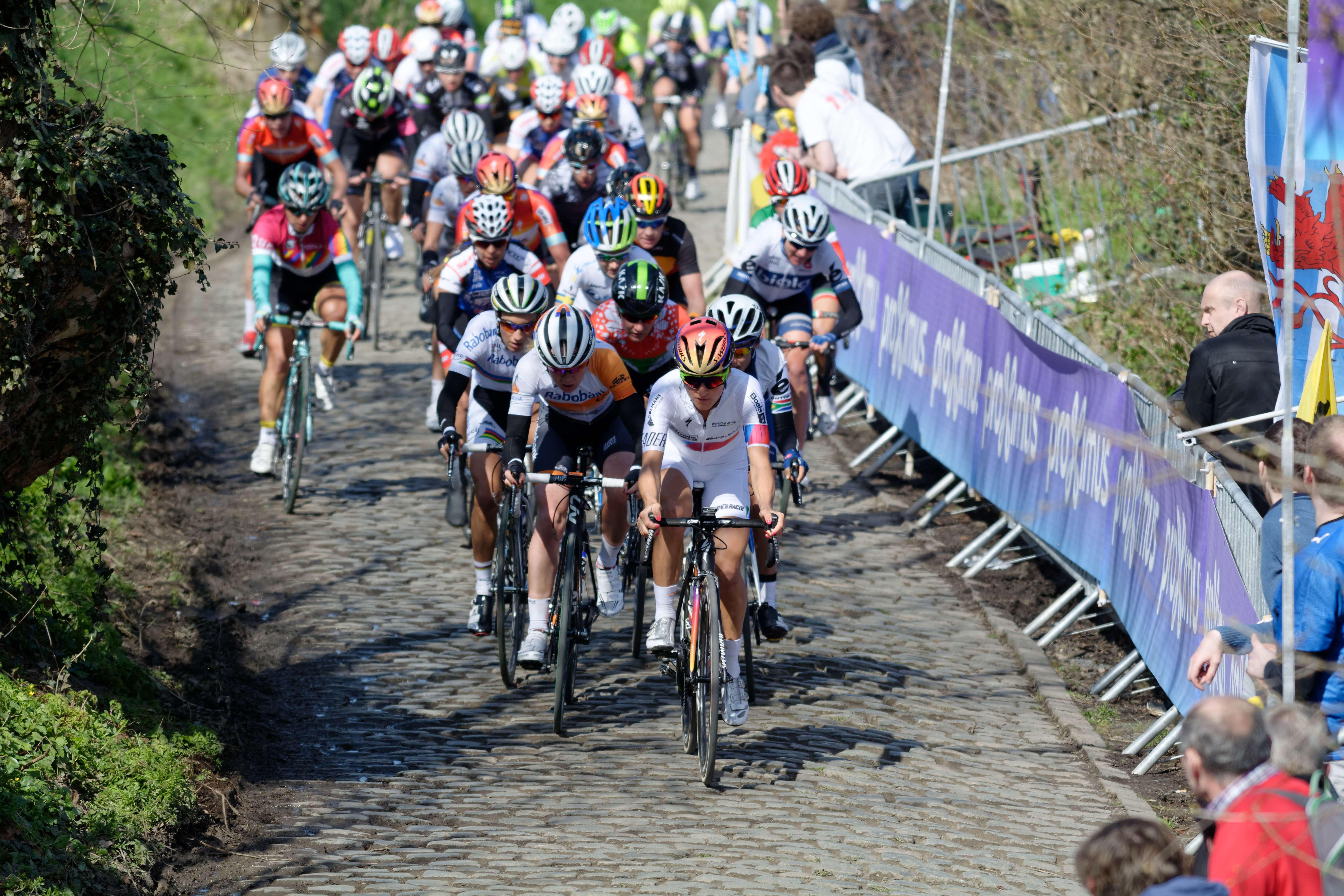 D71_6388_DxO